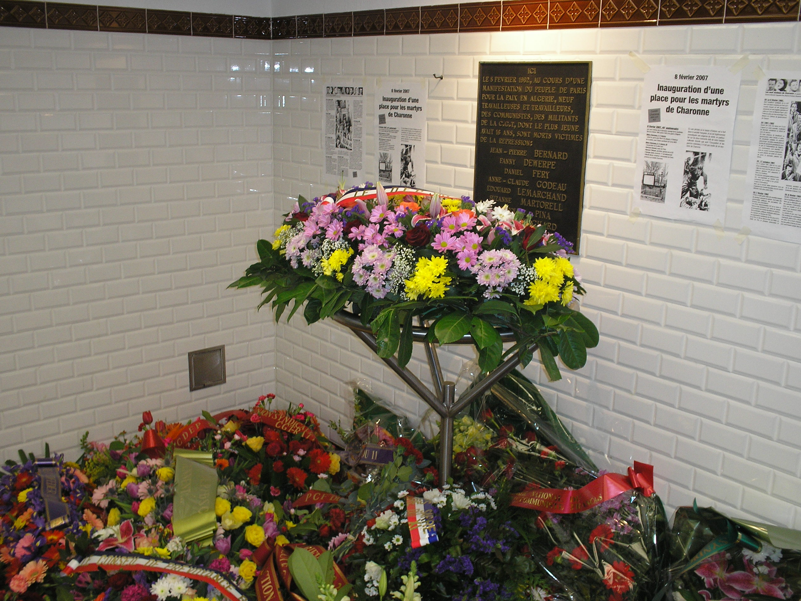 Inauguration de la place du 8 février 1962, fleurissement de la plaque commémorative dans le métro, Paris, France.